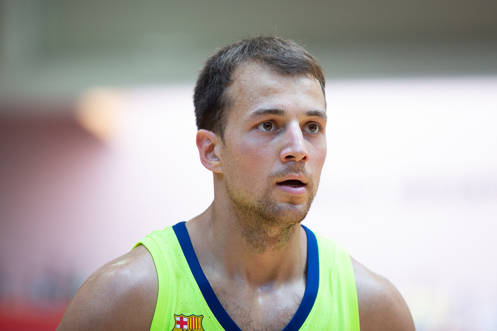 Kevin Pangos en un partido de pretemporada entre el Divina Seguros Joventut y el Lassa Barça a Sant Julià de Vilatorta.